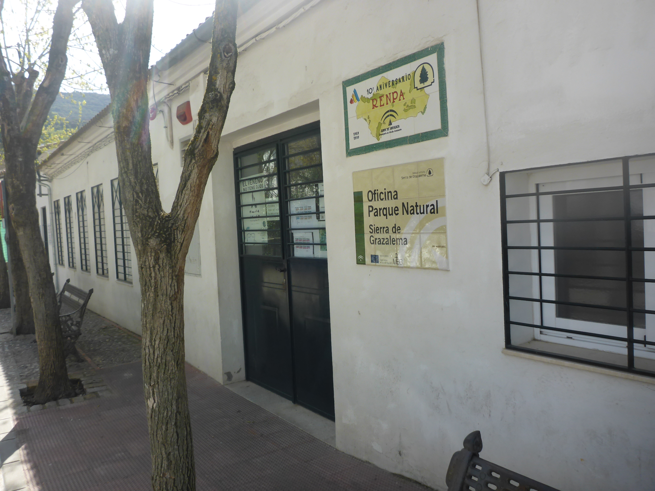 Oficina del Parque Natural Sierra de Grazalema con azulejo del 10º aniversario de la Red de Espacios Naturales Protegidos de Andalucía (Grazalema, Andalucía)